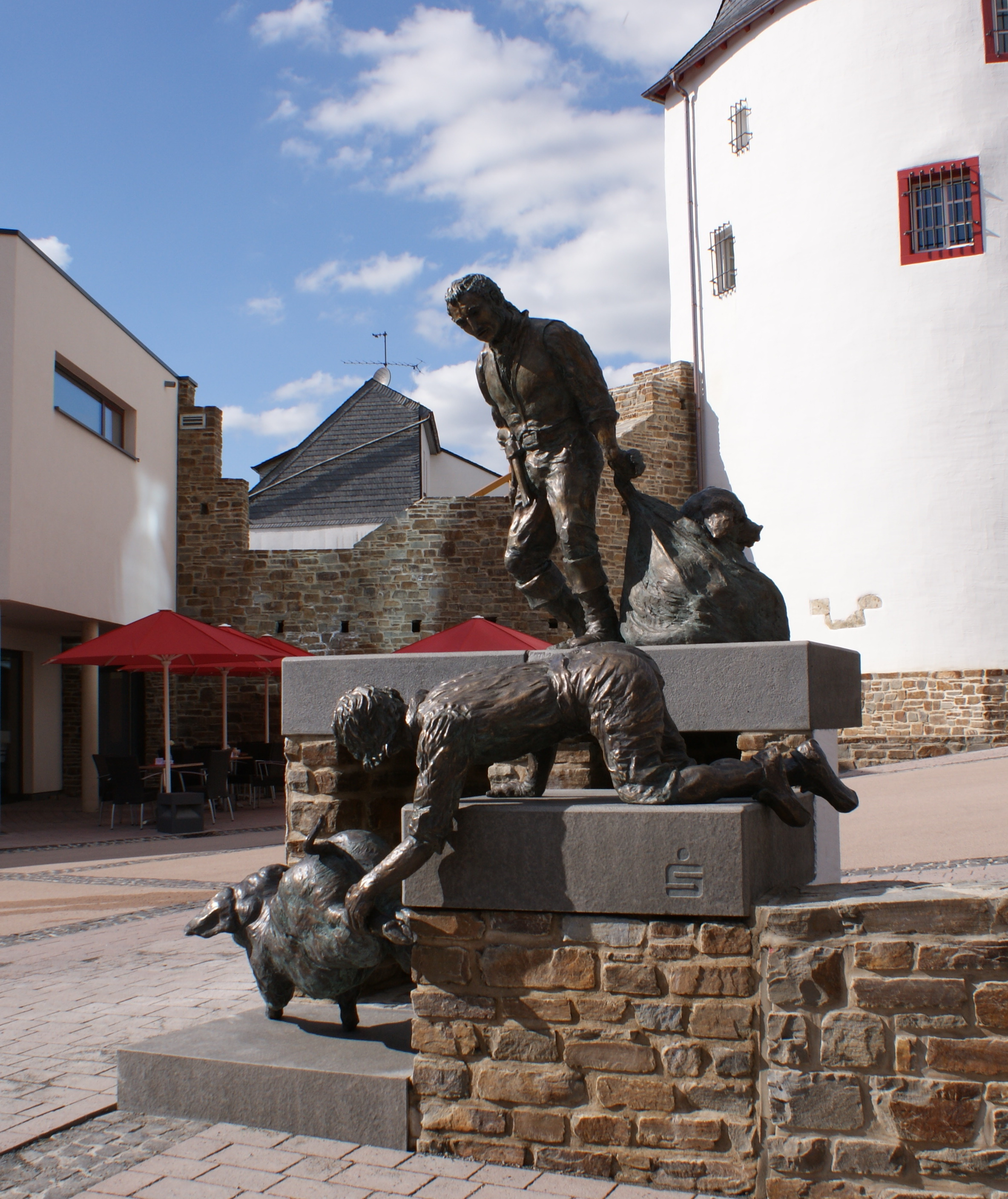 Schinderhannesdenkmal in Simmern/Hunsrück. Plastikengruppe aus Bronze hergestellt 2011 von der Bildhauerin Jutta Reiss